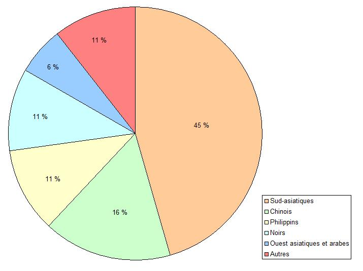 Répartition des minorités visibles, à East York, Toronto (province de l'Ontario, Canada), en 2006.